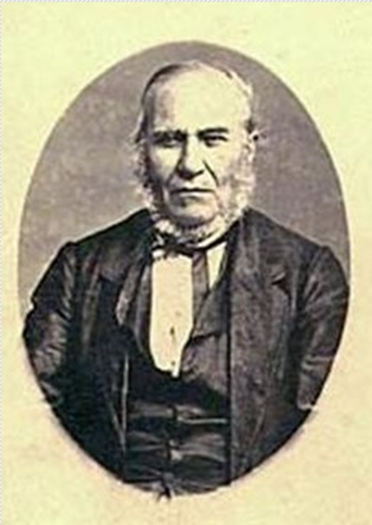 Serapio Ovejero Héroe Nacional de la guerra de Independencia Argentina